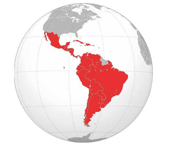 URSAL